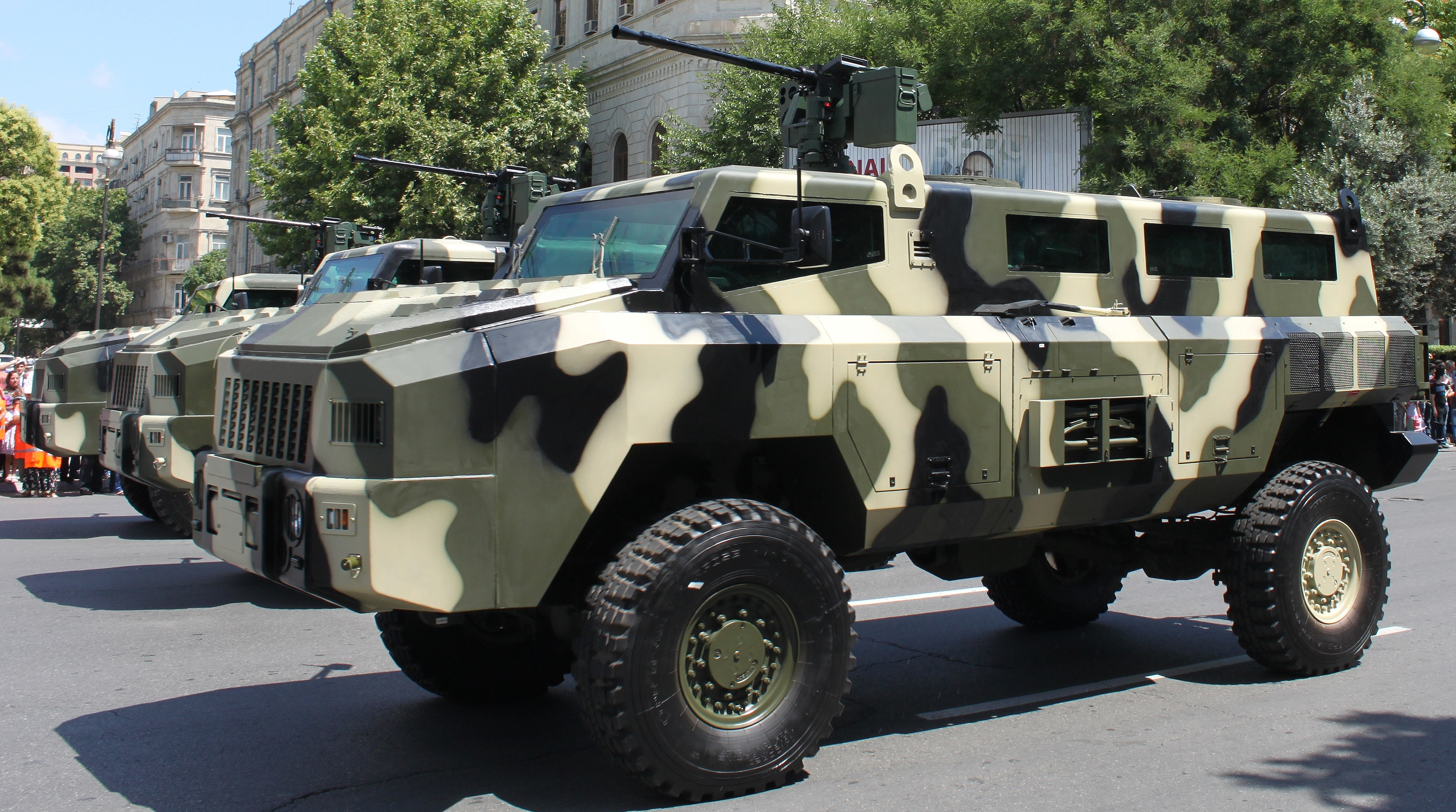 Военный парад в Баку в день вооруженных сил Азербайджана.